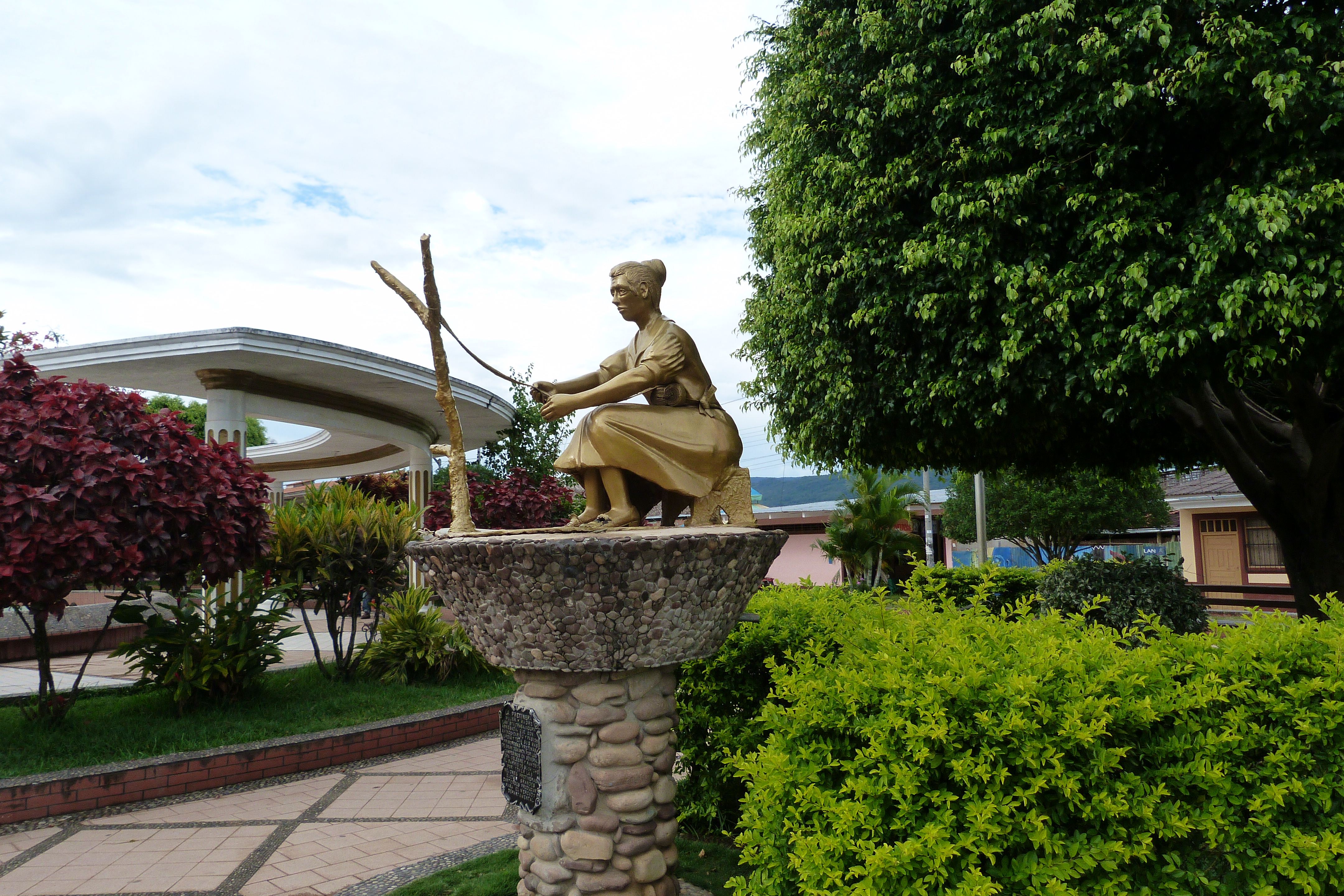 Detalles de las estatuas en la plaza de armas de Lamas, San Martín.